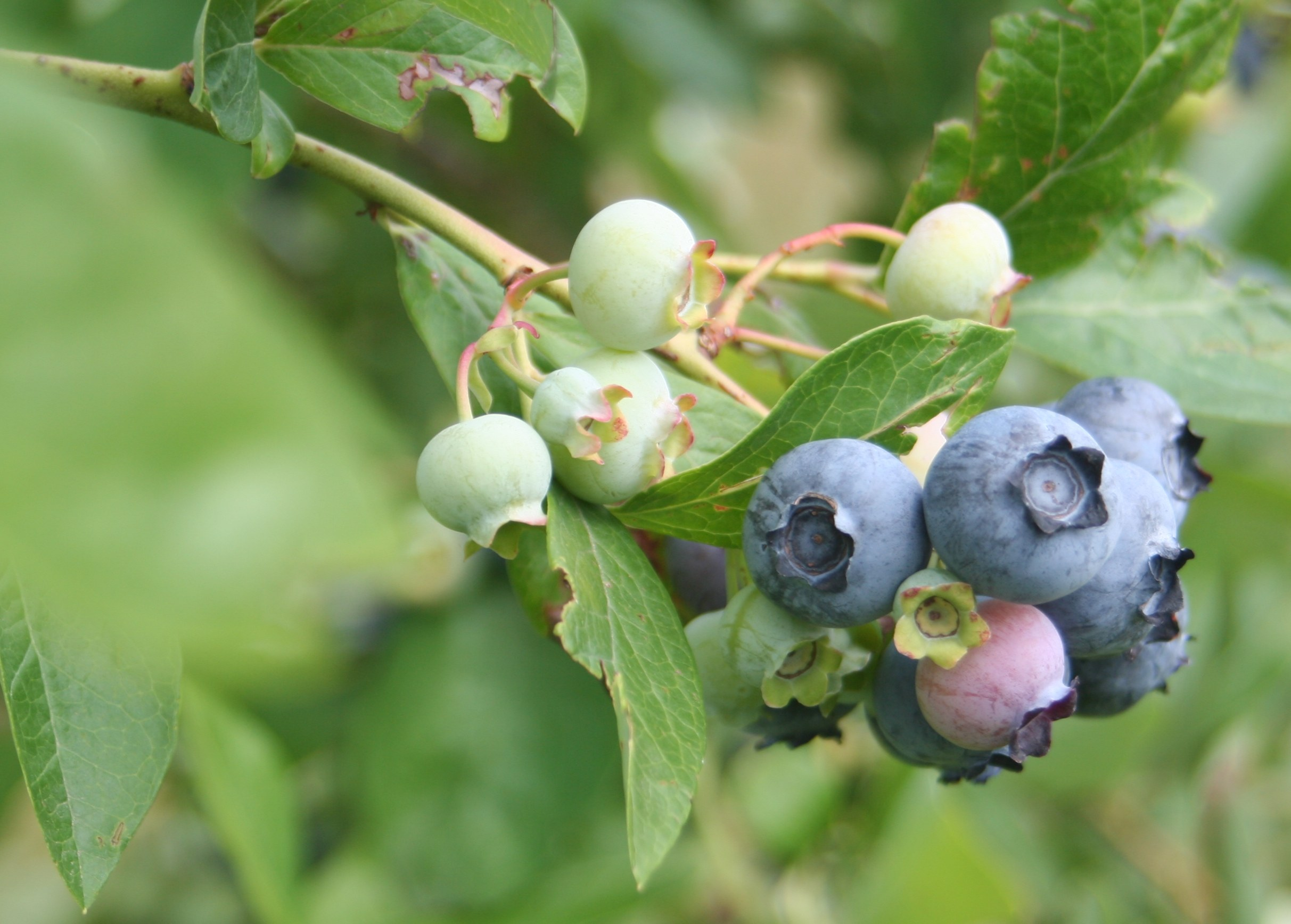 French Blueberries (Bluet des Vosges). Dan the Man, July 2006